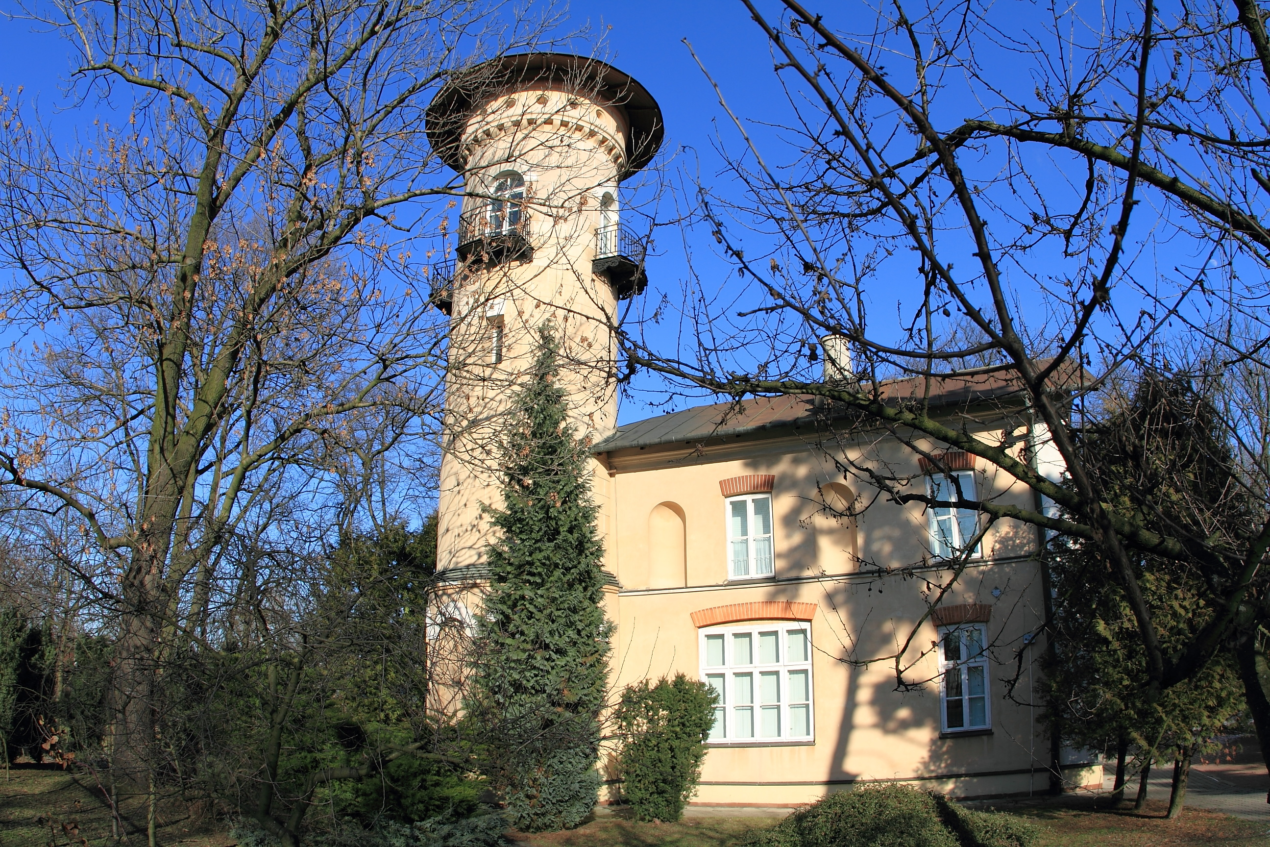 Dawny dworzec kolejowy w Grodzisku Mazowieckim. Obecnie siedziba Krajowego Ośrodka Badań i Dokumentacji Zabytków.